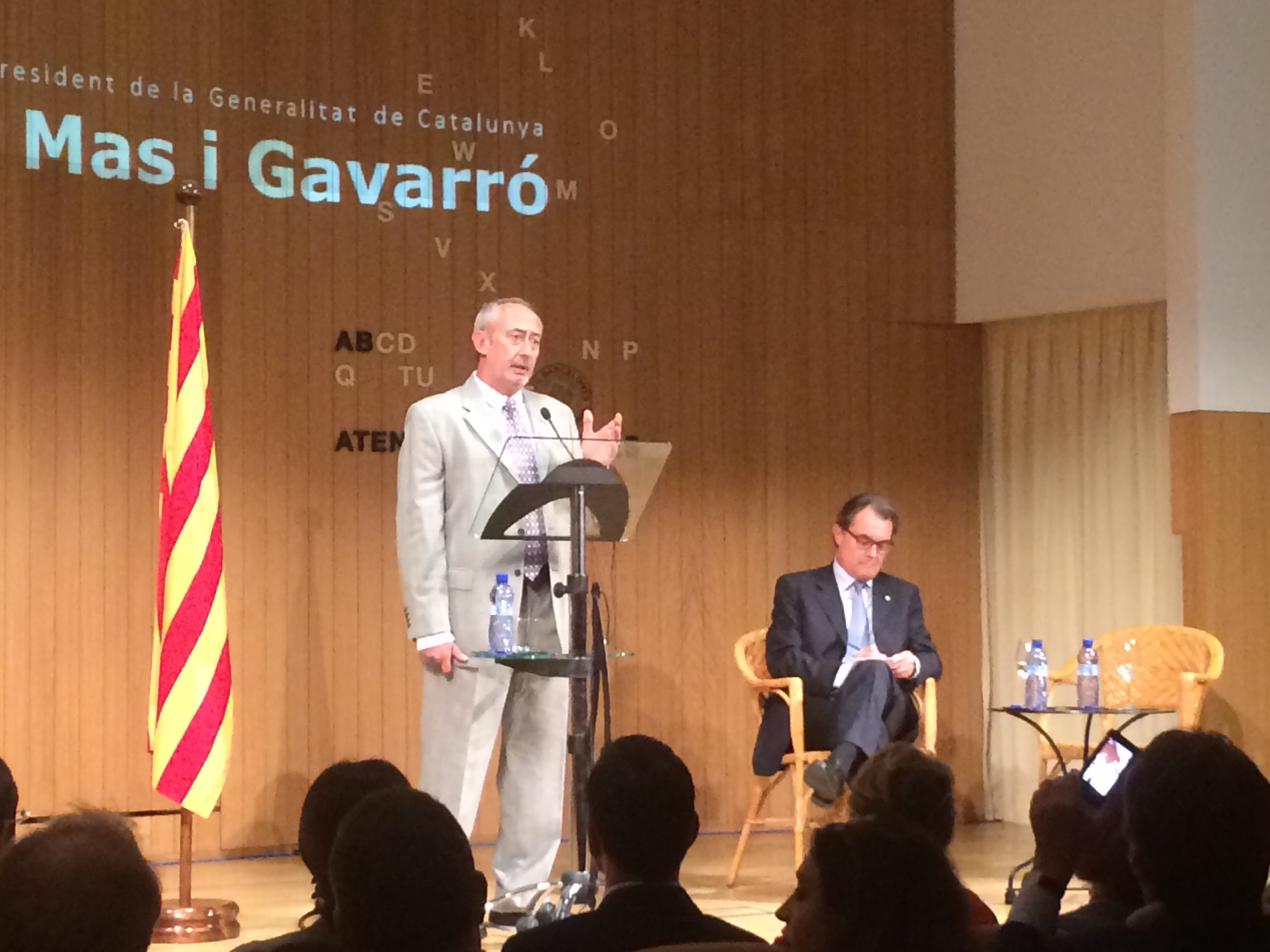 Jordi Casassas, president de l'Ateneu Barcelonès, presentant a Artur Mas, president de la Generalitat de Catalunya, en el discurs inaugural del curs 2014-2015 a l'Ateneu Barcelonès, el 7-10-2014